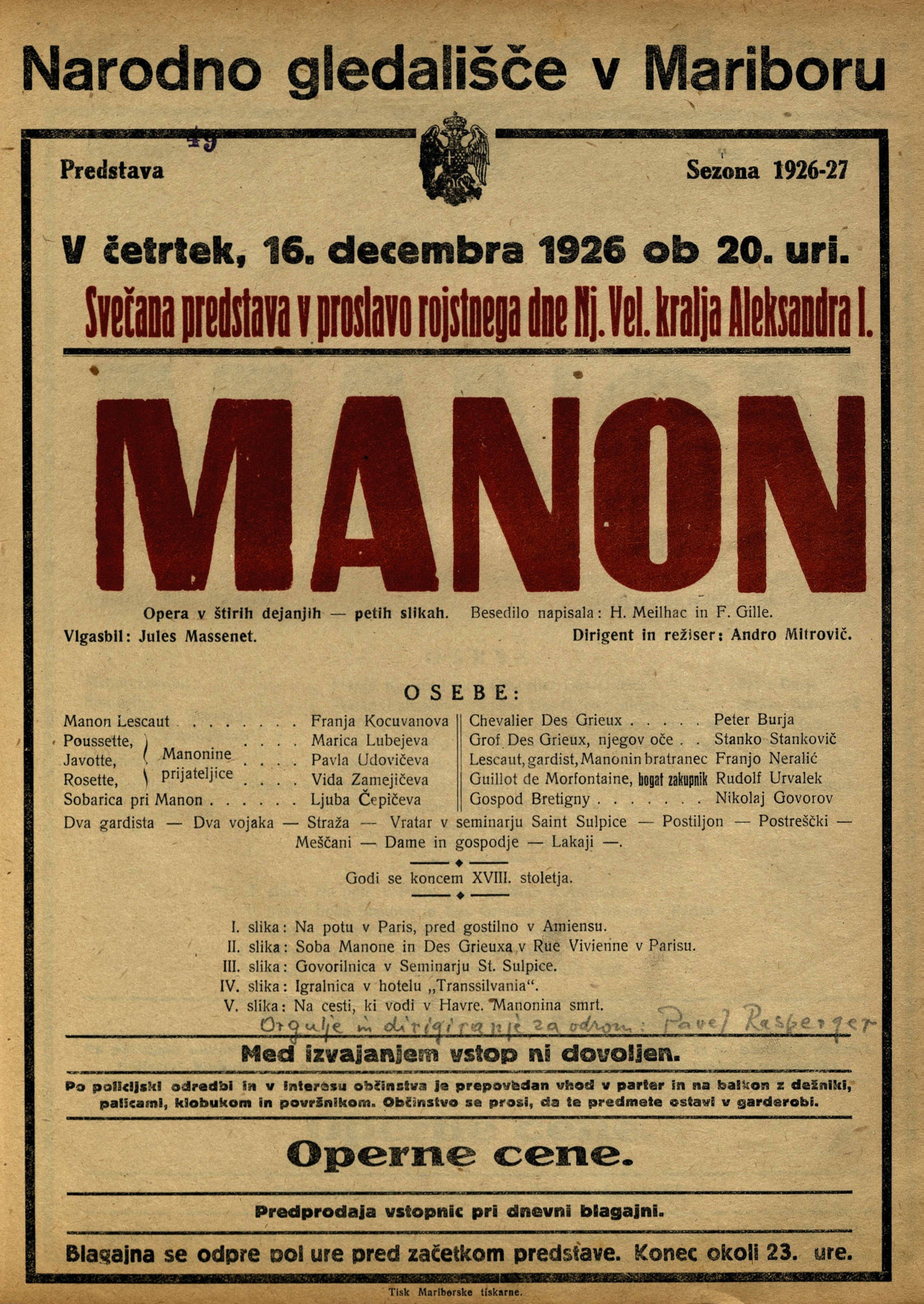 Plakat za prestavo Manon v Narodnem gledališču v Mariboru.